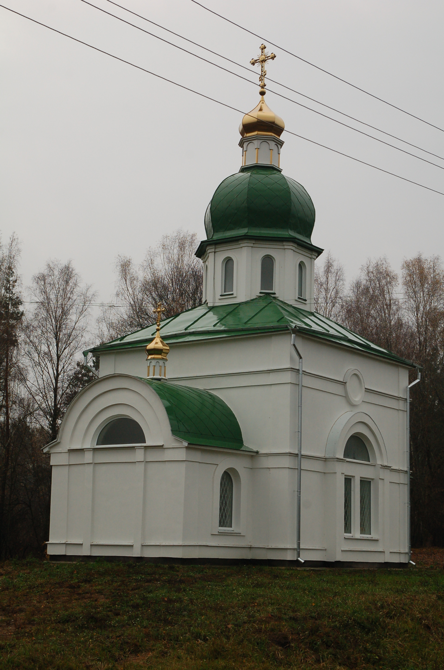 Церква Вознесіння Господнього в селі Рудня, Сосницького району, Чернігівської області